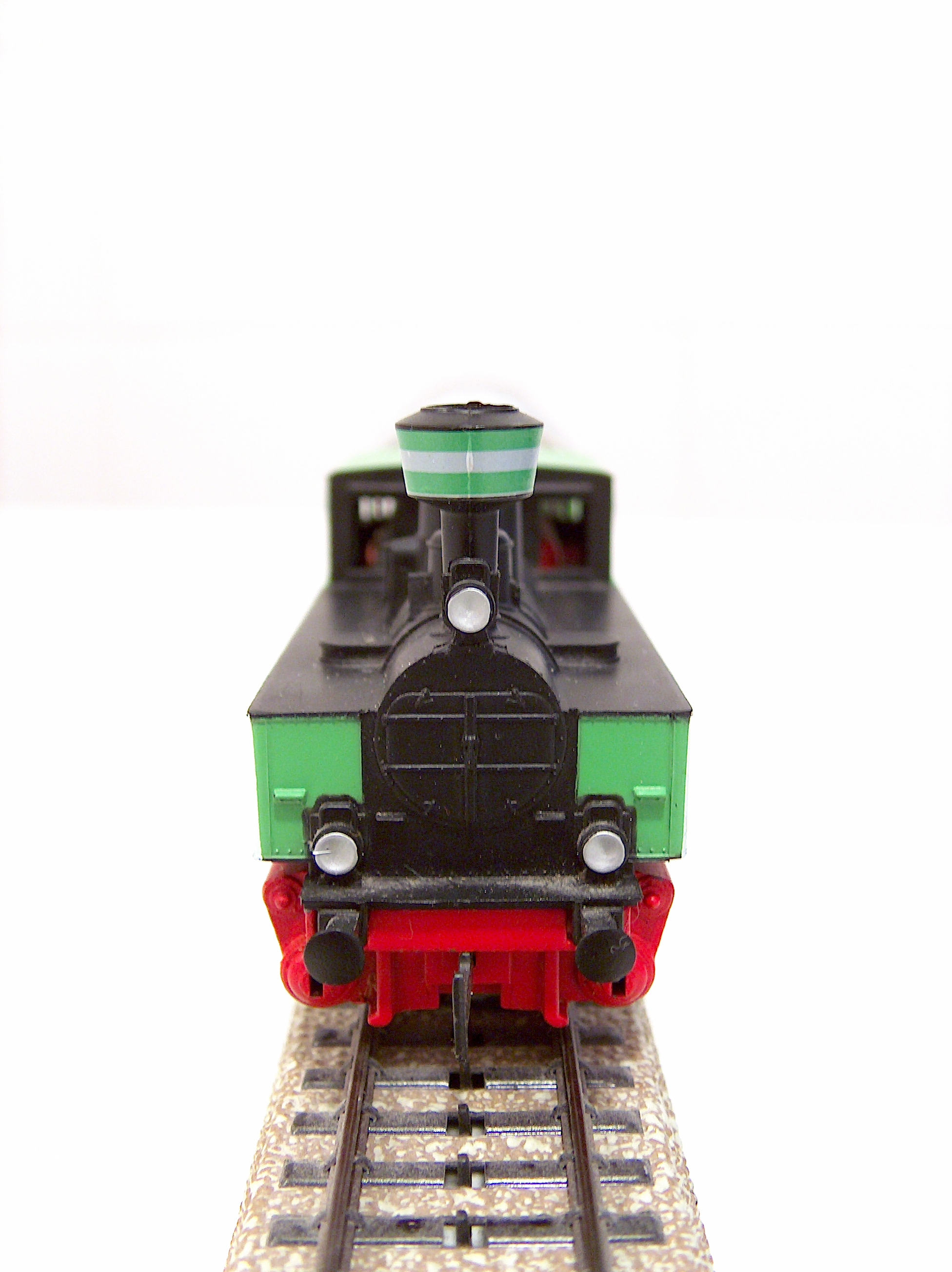 Model train Märklin Primex Zirkuswelt 3182